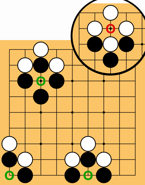 Diagramme pour la règle du jeu de go